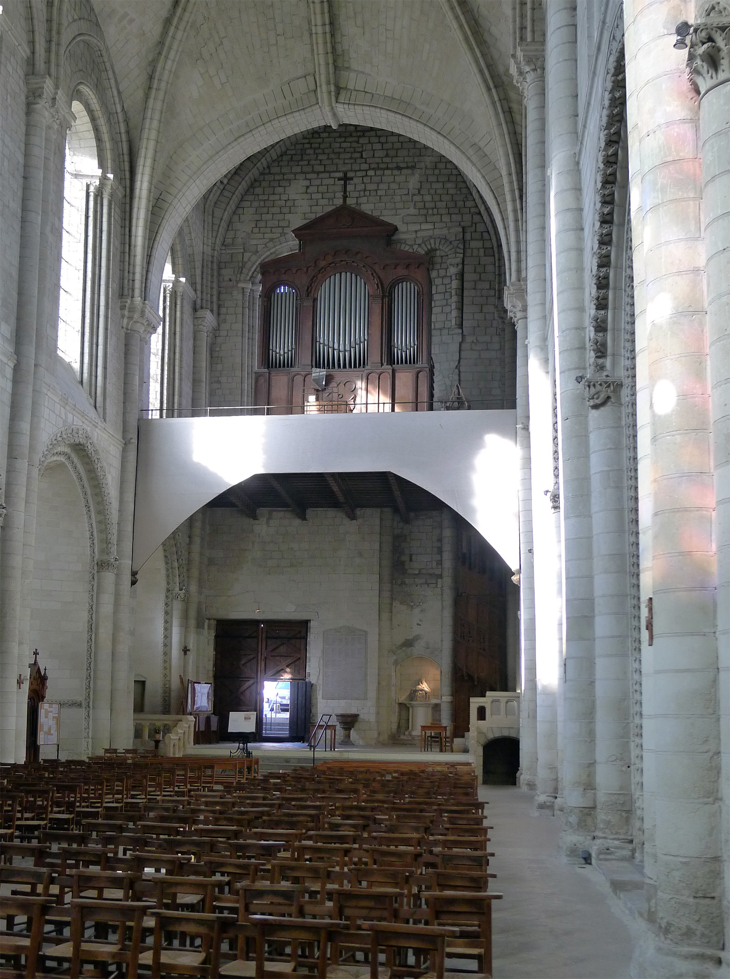 Église de la Trinité (vue intérieure de la nef) - Angers (France)